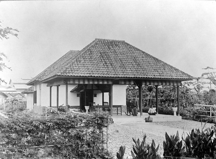 Repronegatief. Suikerindustrie, het huis van kamponghoofd Sf. Tjomal, Java